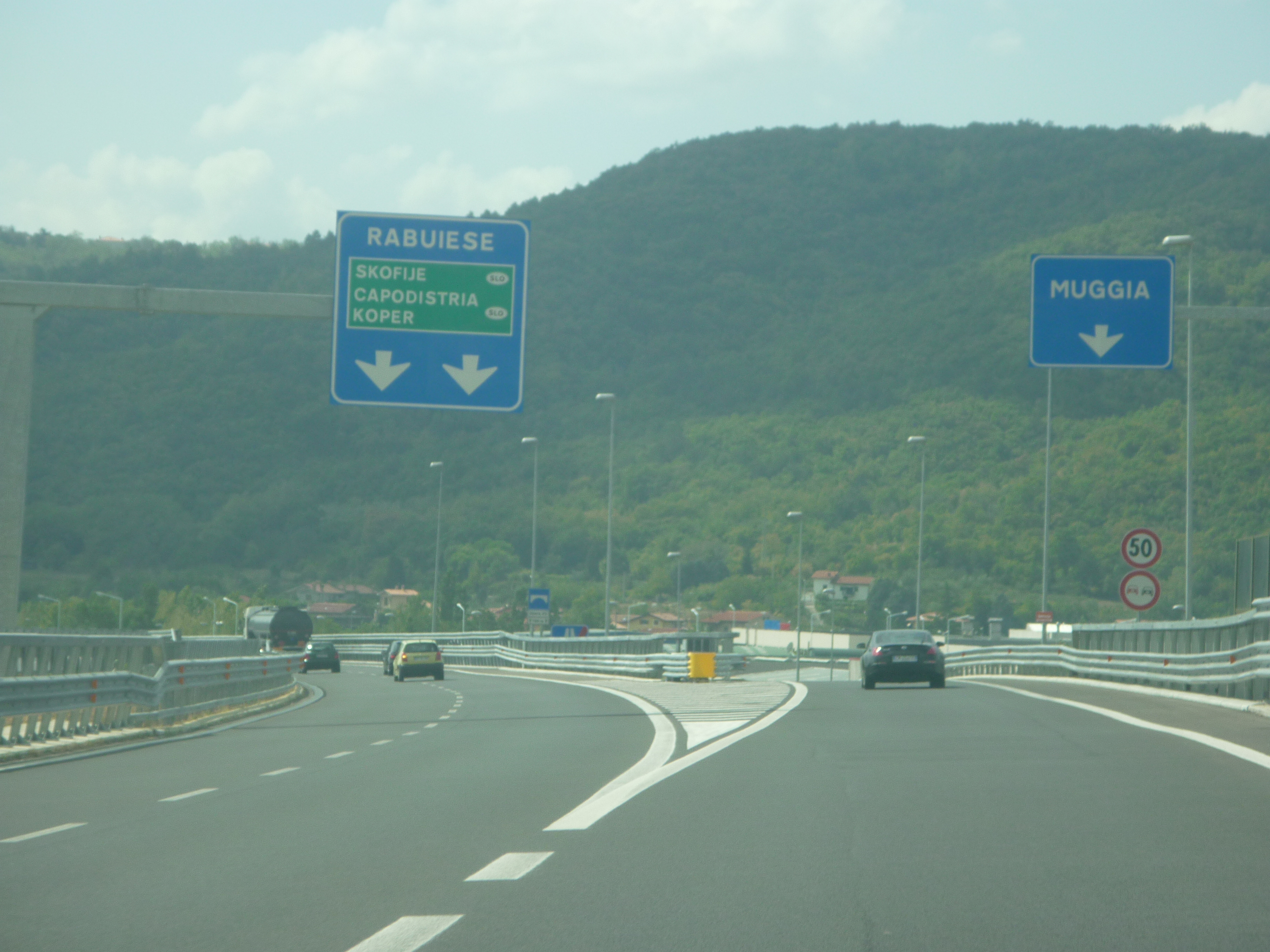 ra